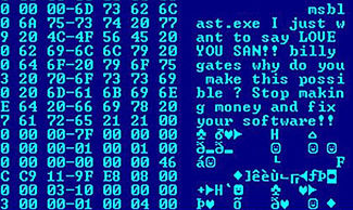 کوردی: virus